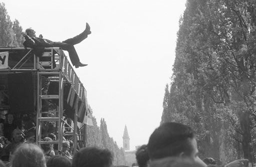 Union Move am 23. Mai 1998 in München auf der Leopoldstraße